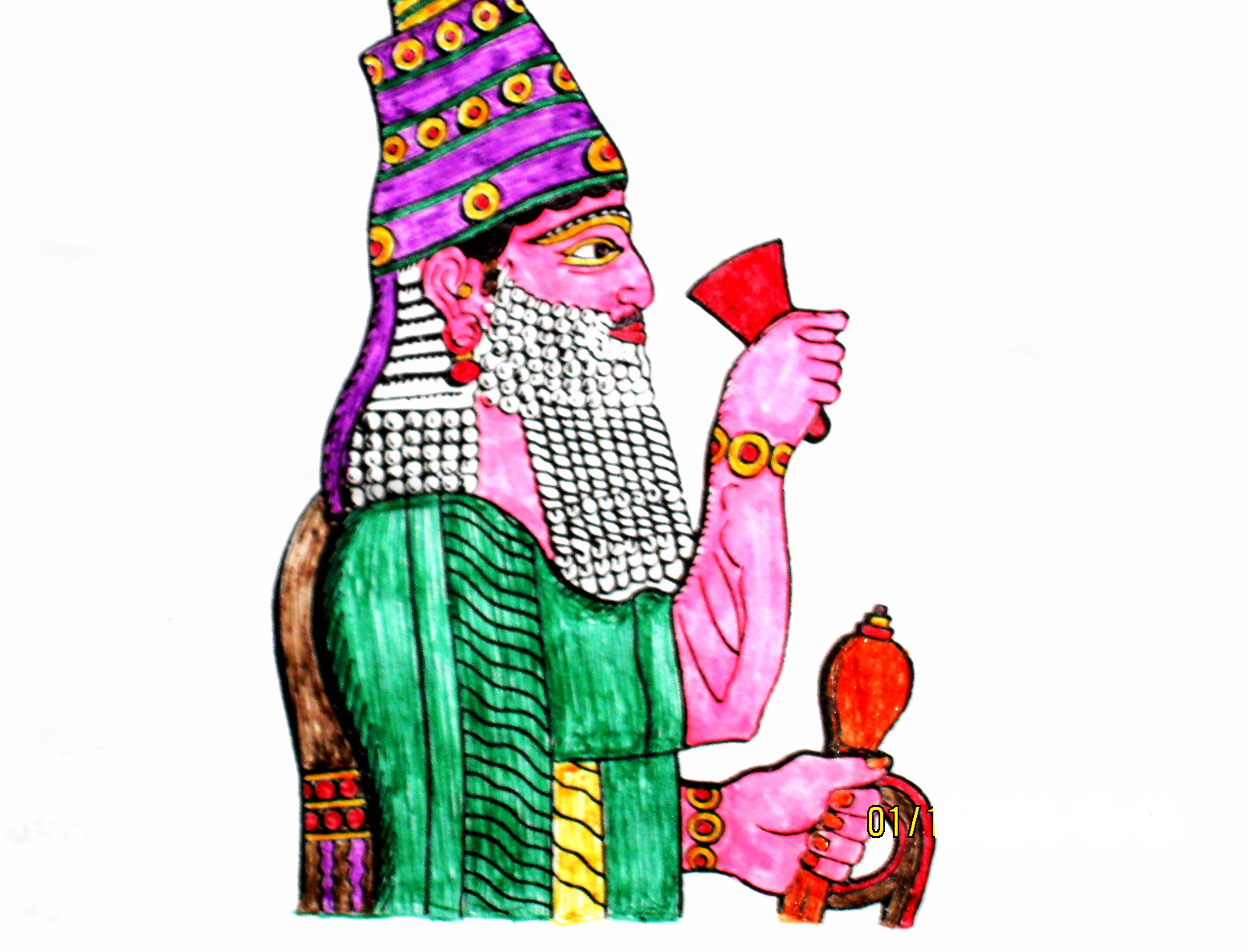 یکی از واپسین پادشاهان قدرتمند آشور محتملا اسرحدّون که توسط قبایل مادی کولومان پیرامون سال‌های ۶۷۴-۶۷۳ پ. م. هلاک شد